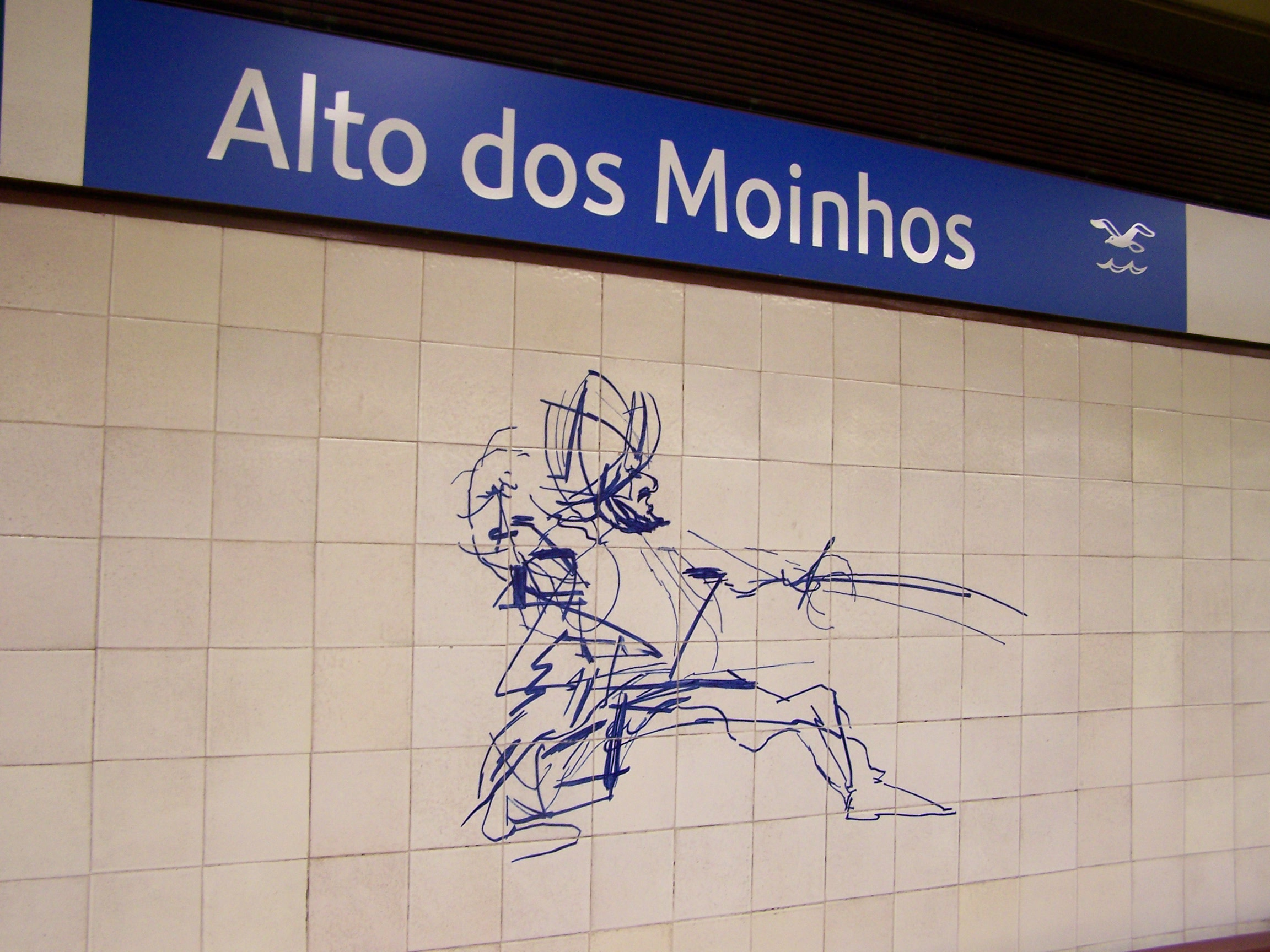 Station sign at Lisbons metro station Alto dos Moinhos, blue line. Letreiro na estação Alto dos Moinhos do metro de Lisboa, linha azul; azulejos by Júlio Pomar.